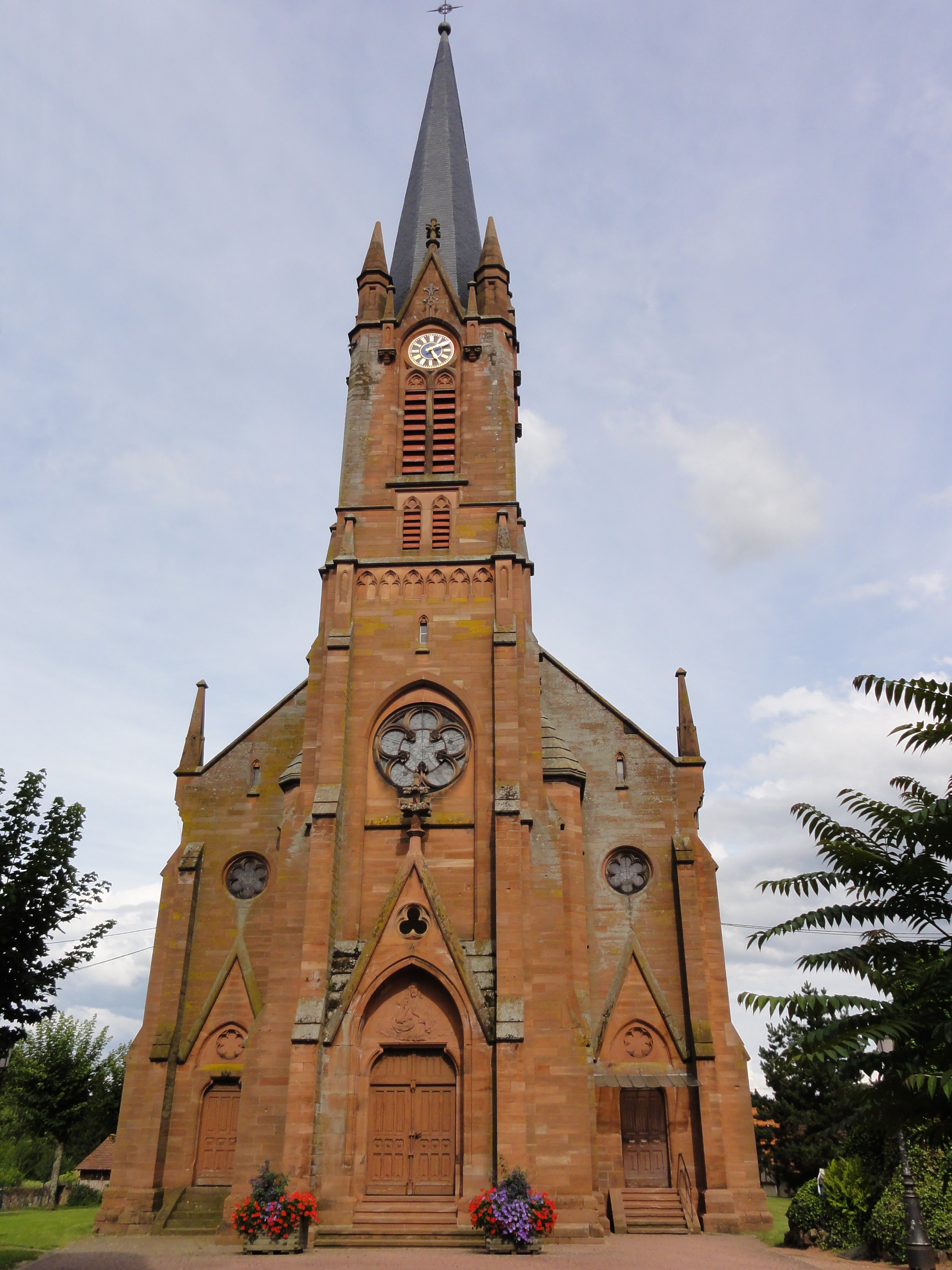 Alsace, Bas-Rhin, Église Sainte-Marie-Madeleine d'Ingwiller (IA67009758).